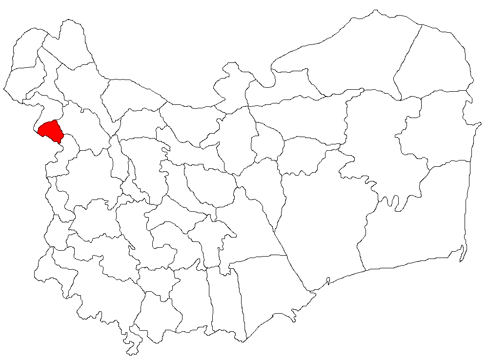 Categorie:Hărţi ale judeţului Tulcea